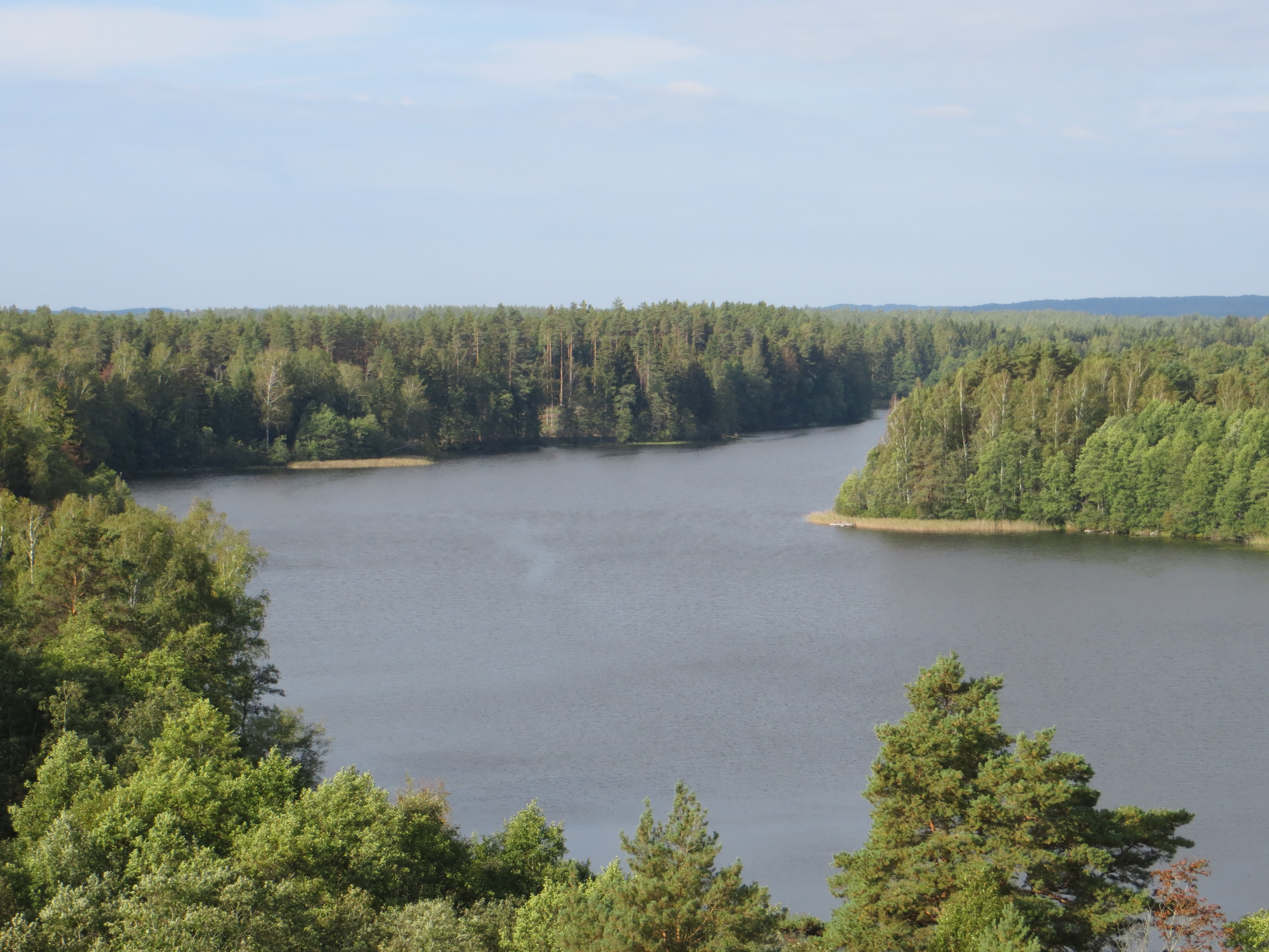 Kazitiškio sen., Lithuania